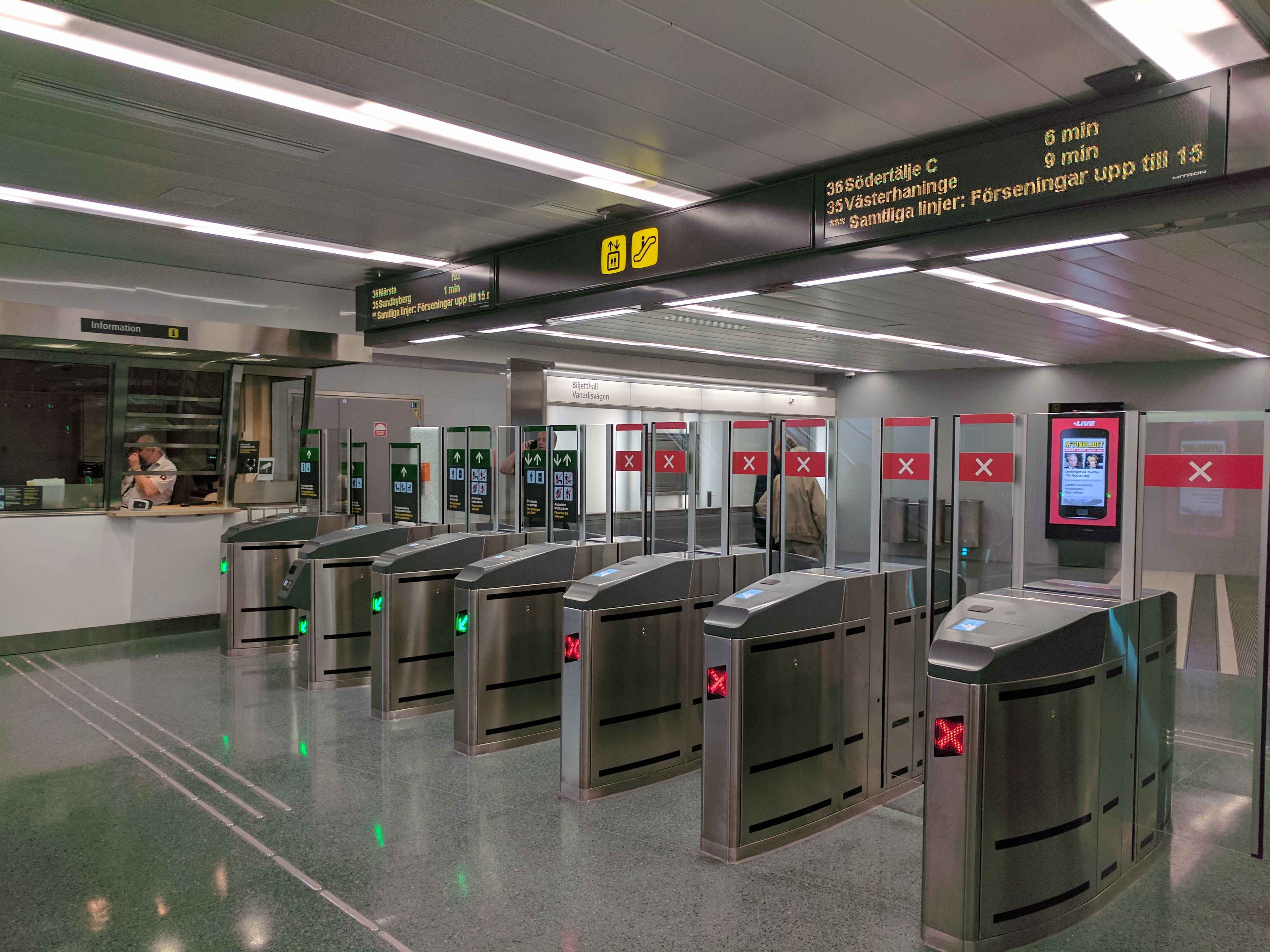 Odenplan 20170710